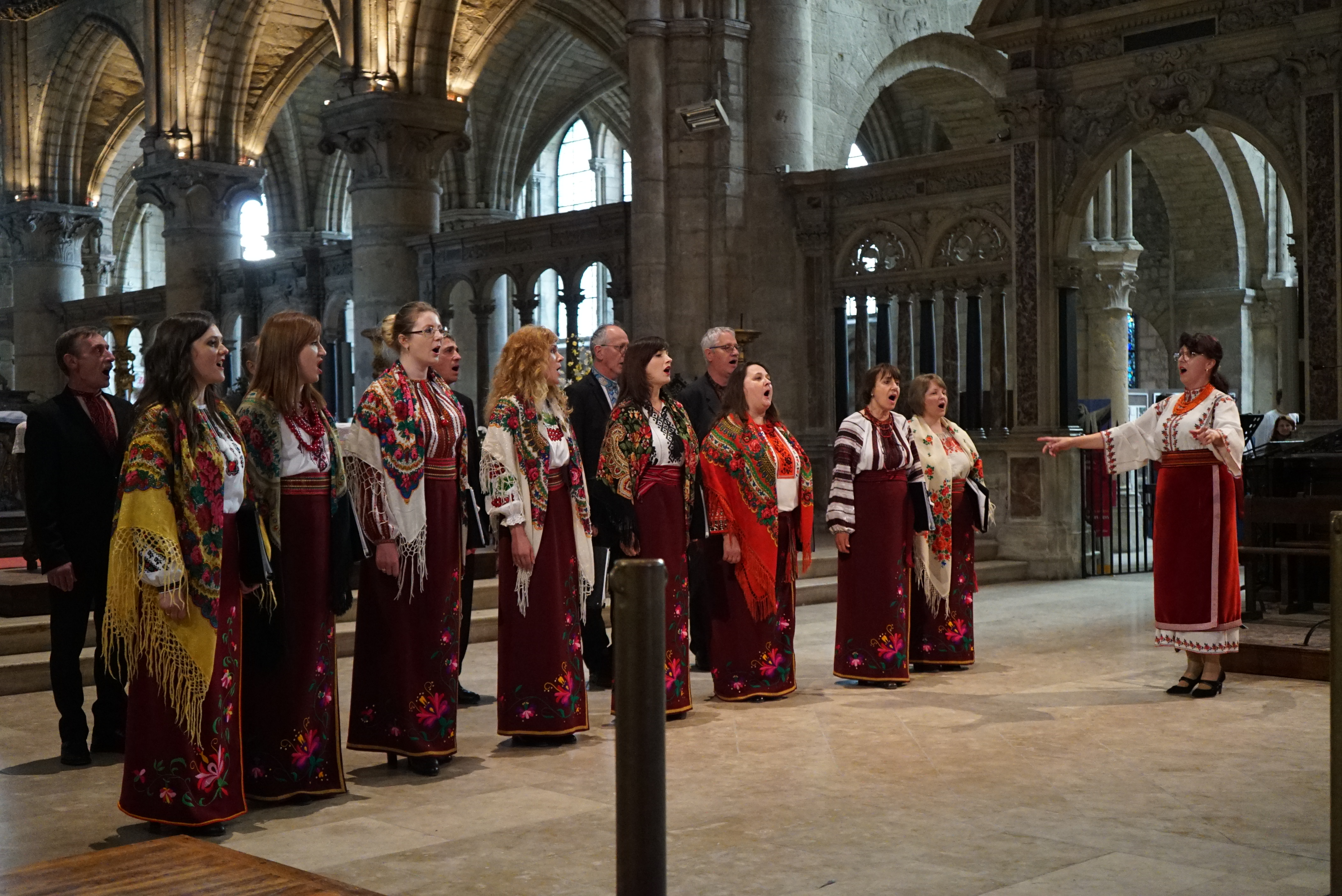 rencontre en l'honneur de l'anniversaire de mariage puis le couronnement d'Anne de Kiev donné en la basilique st-Remi.